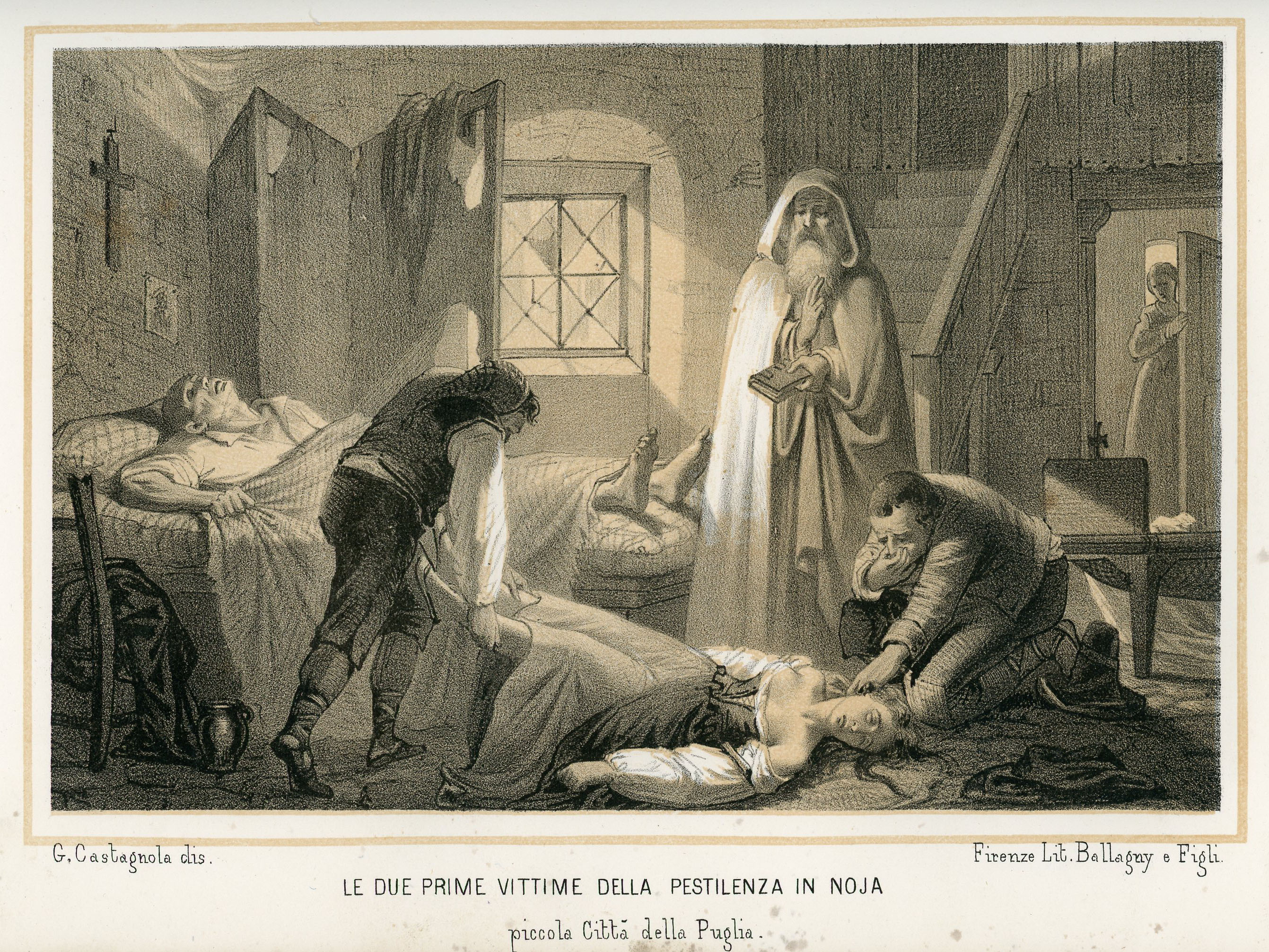 Le due prime vittime della pestilenza in Noja piccola città della Puglia (litografia).